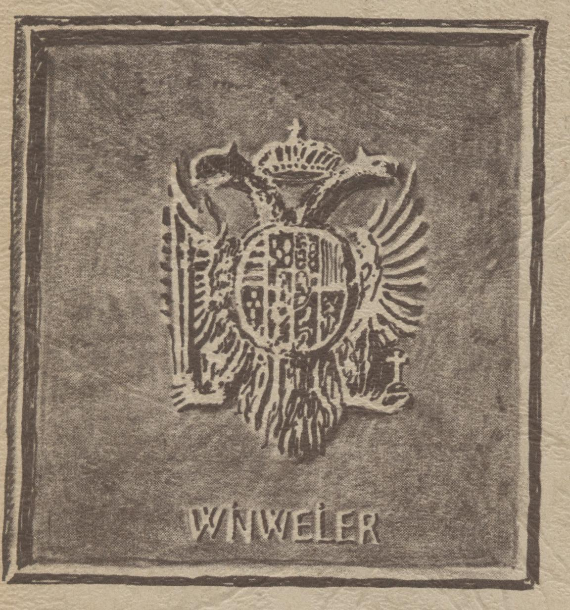 Ofenpkatte Winnweiler, um 1780